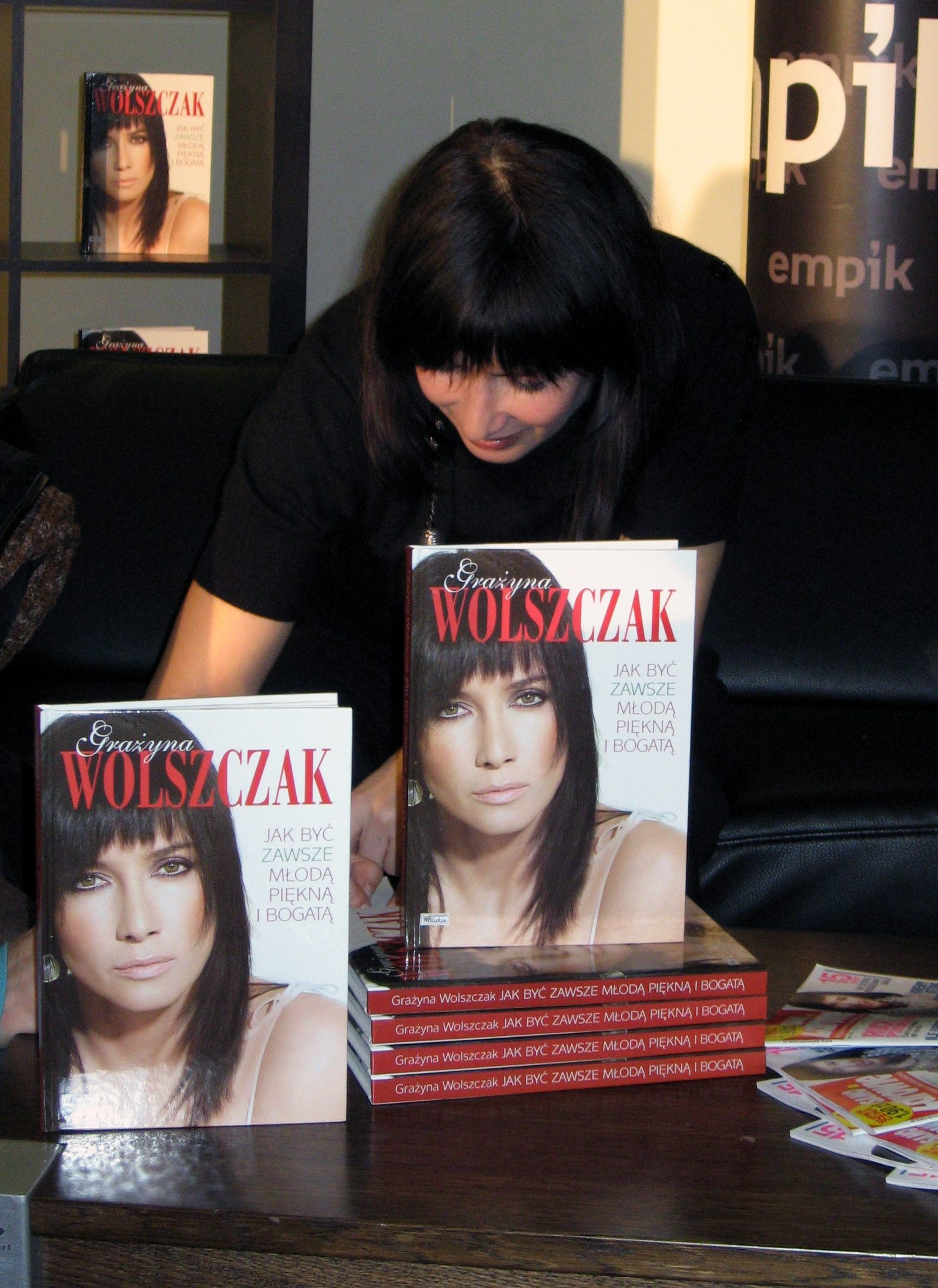 Grażyna Wolszczak podpisuje swoją książkę "Jak być piękną, młodą i bogatą" w Salonie Empik Junior w Warszawie (7 marca 2008)